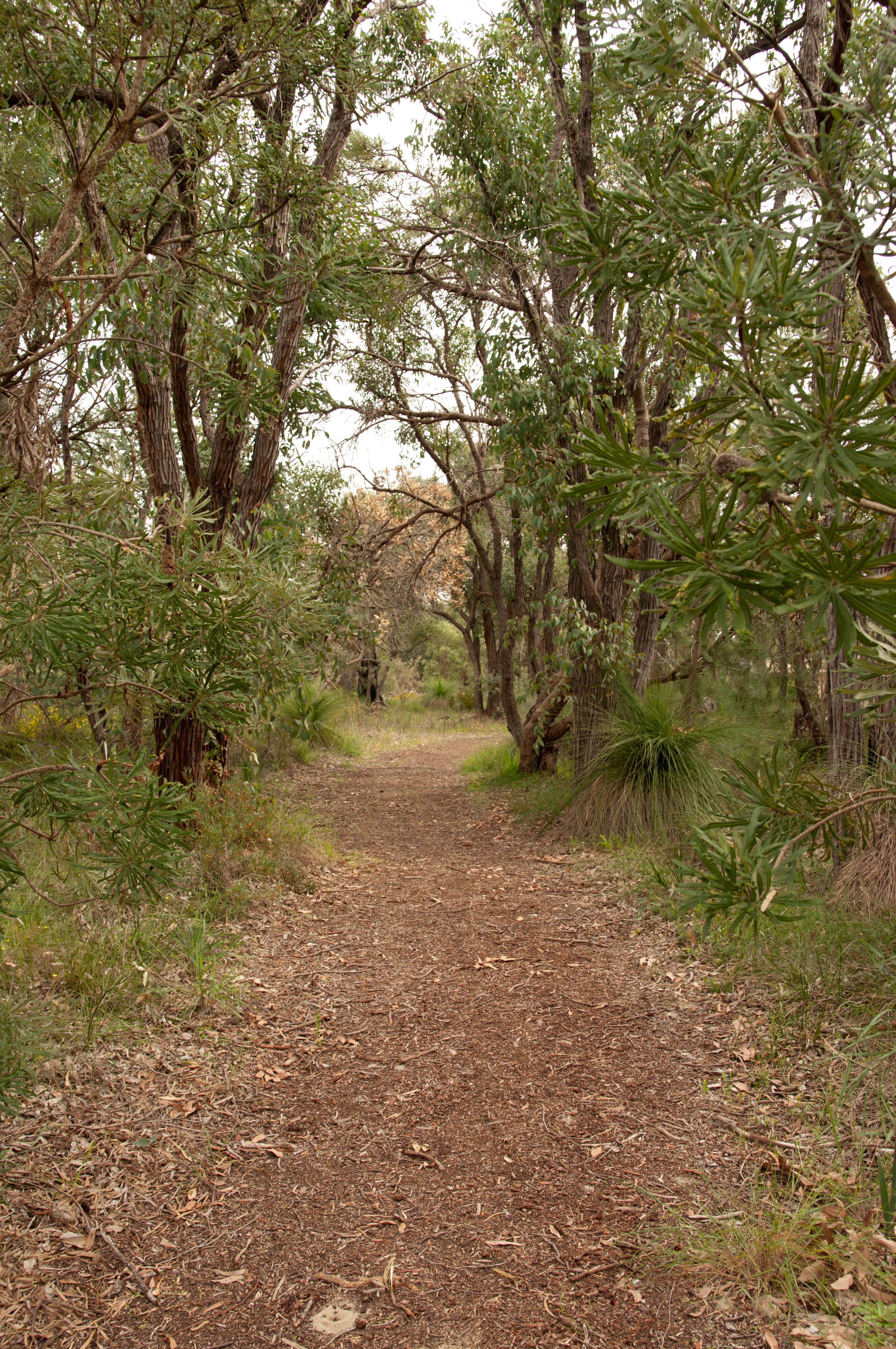 Banksia woodlands in Beeliar Wetlands Murdoch